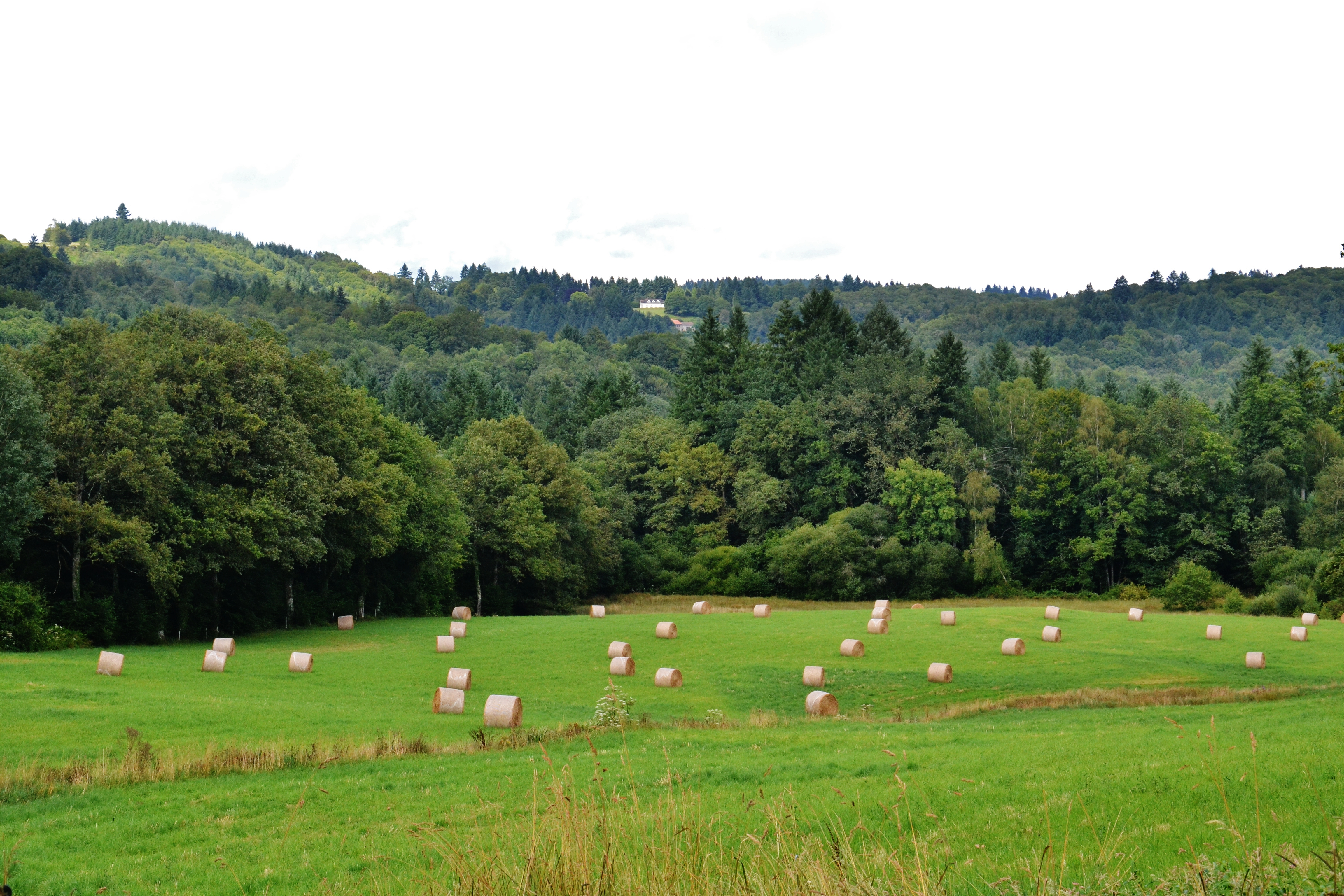 Paysage rural des monts d'Ambazac, près du Grand Royères, commune de Bonnac-la-Côte (Haute-Vienne, France)